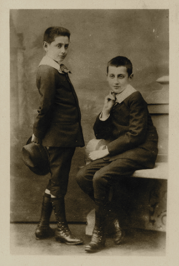 Marcel Proust et son frère Robert en 1885. Photo carte de visite par Hermann et Cie, 20 rue de la Chaussée d'Antin, Paris